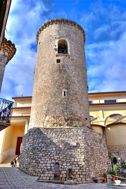 Torre dei Provenzali, San Marco dei Cavoti (BN), Italia. Risale al XIV sec.; originariamente carcere, ora è torre campanaria.